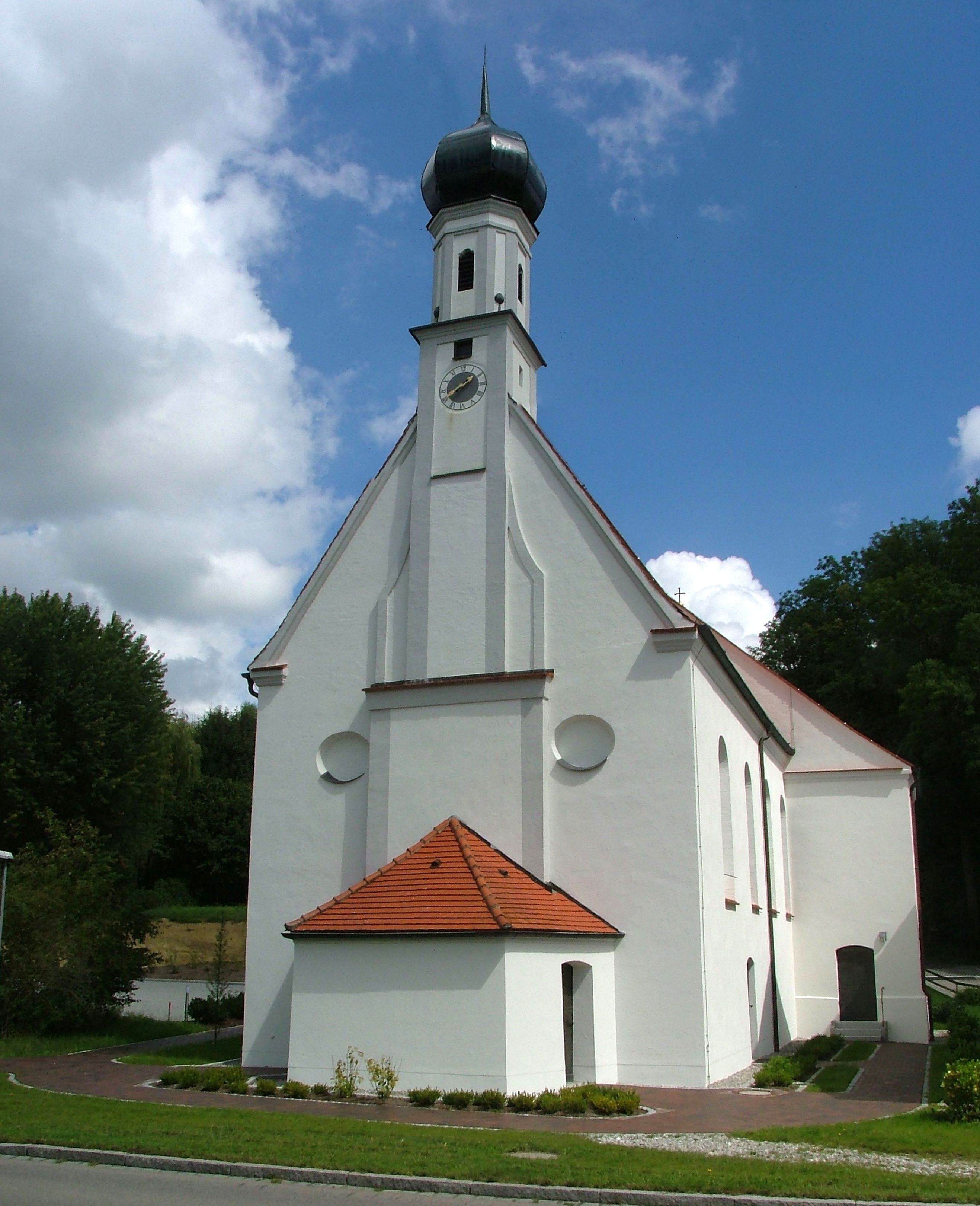 Wallfahrtskirche